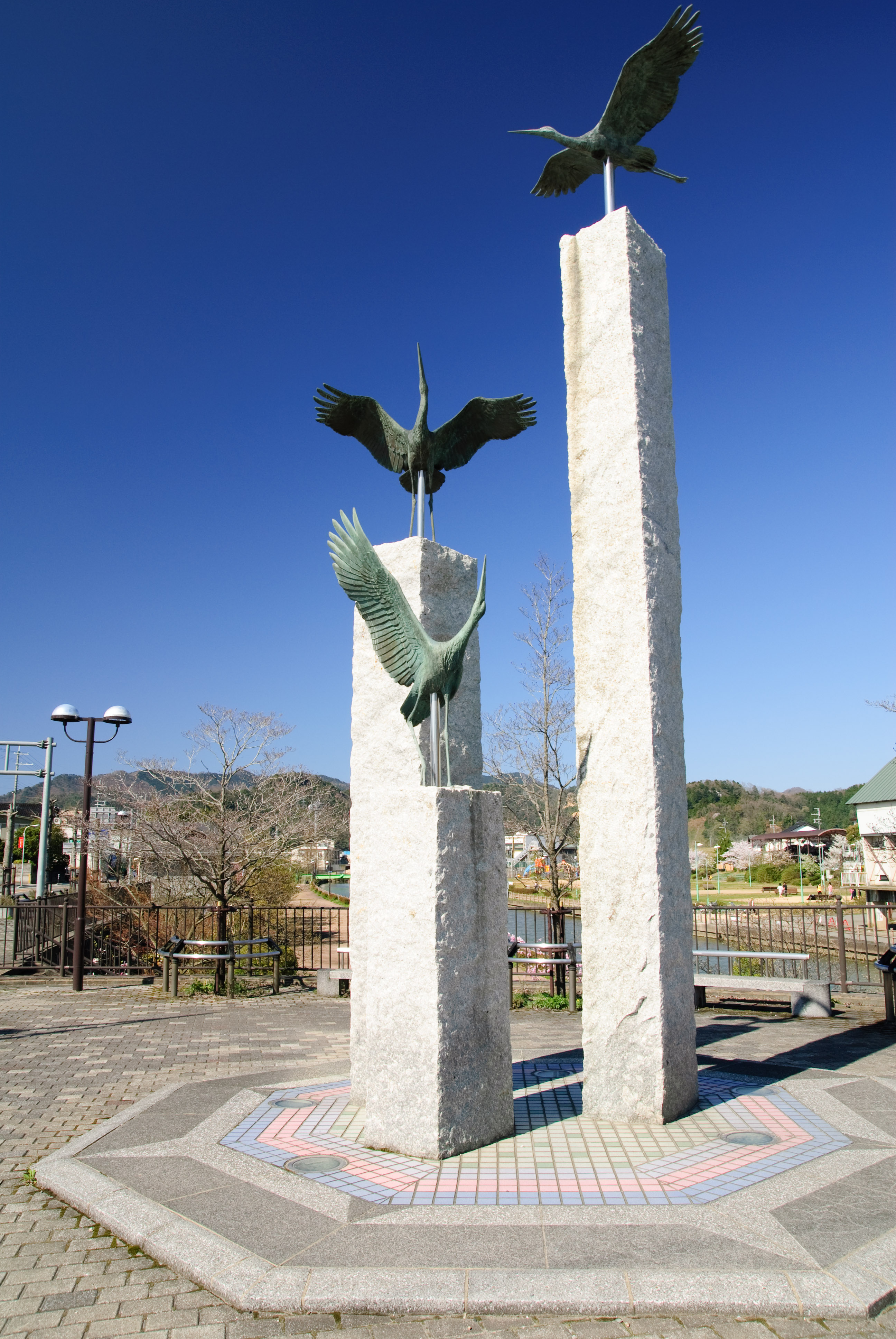 豊岡市中央公園のモニュメント